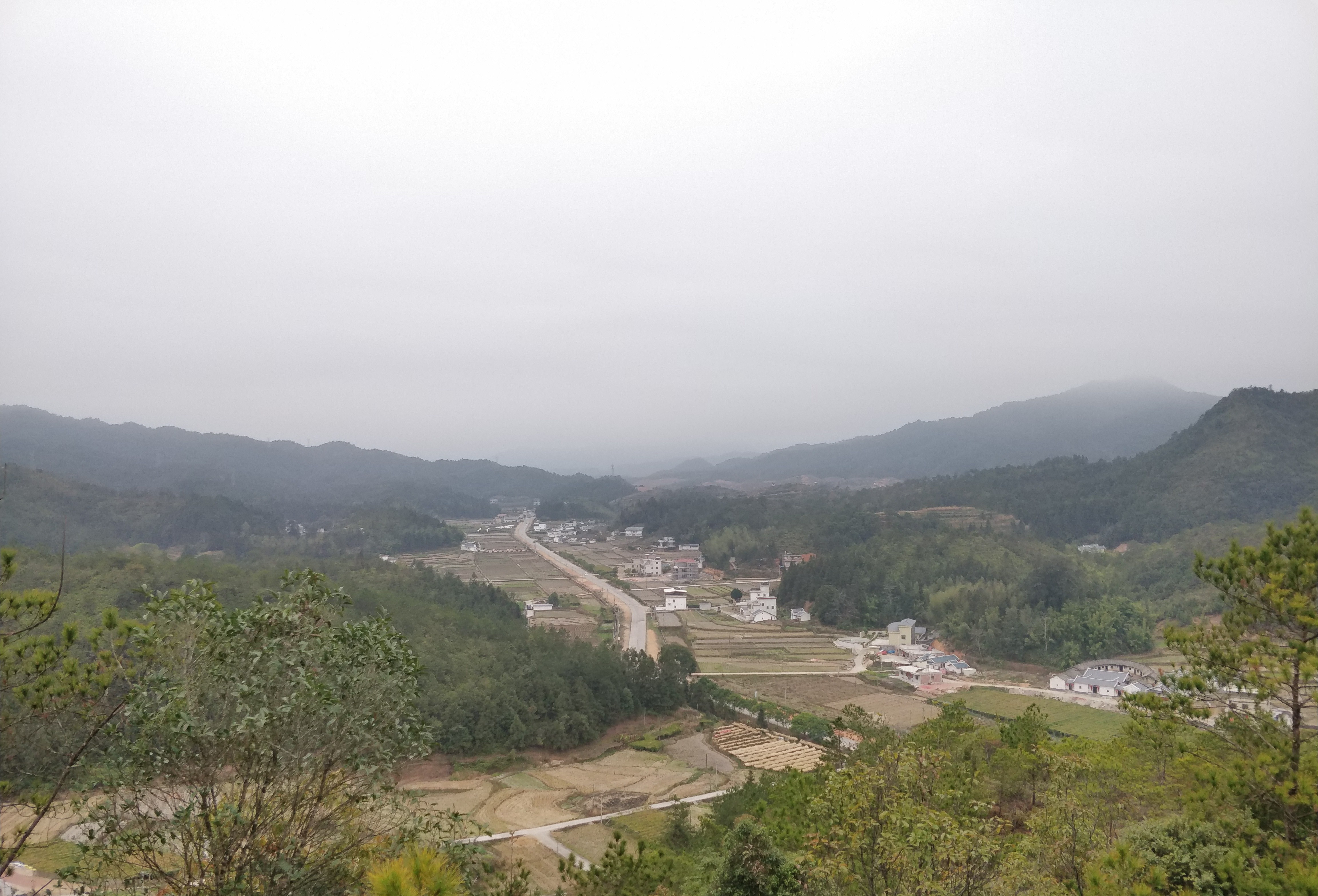 广东省梅州市平远县仁居镇上远村山峰上俯瞰全村